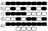 Confirmo que el gráfico fue creado para Wikipedia, a la que cedo todos los derechos. Untrozo 12:19 15 may, 2005 (CEST)